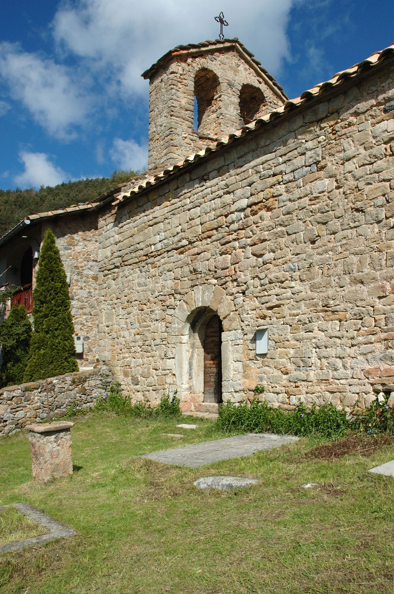 Església de Sant Romà de la Clusa, en el municipi berguedà del Castell de l'Areny